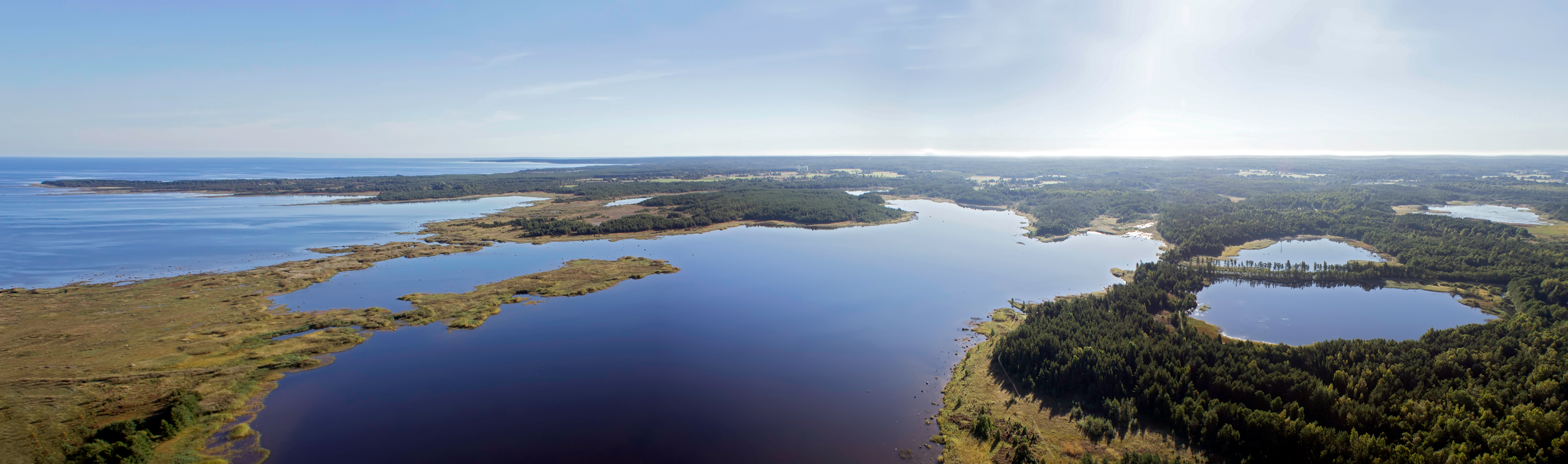 Kõrgessaare Köönaauk